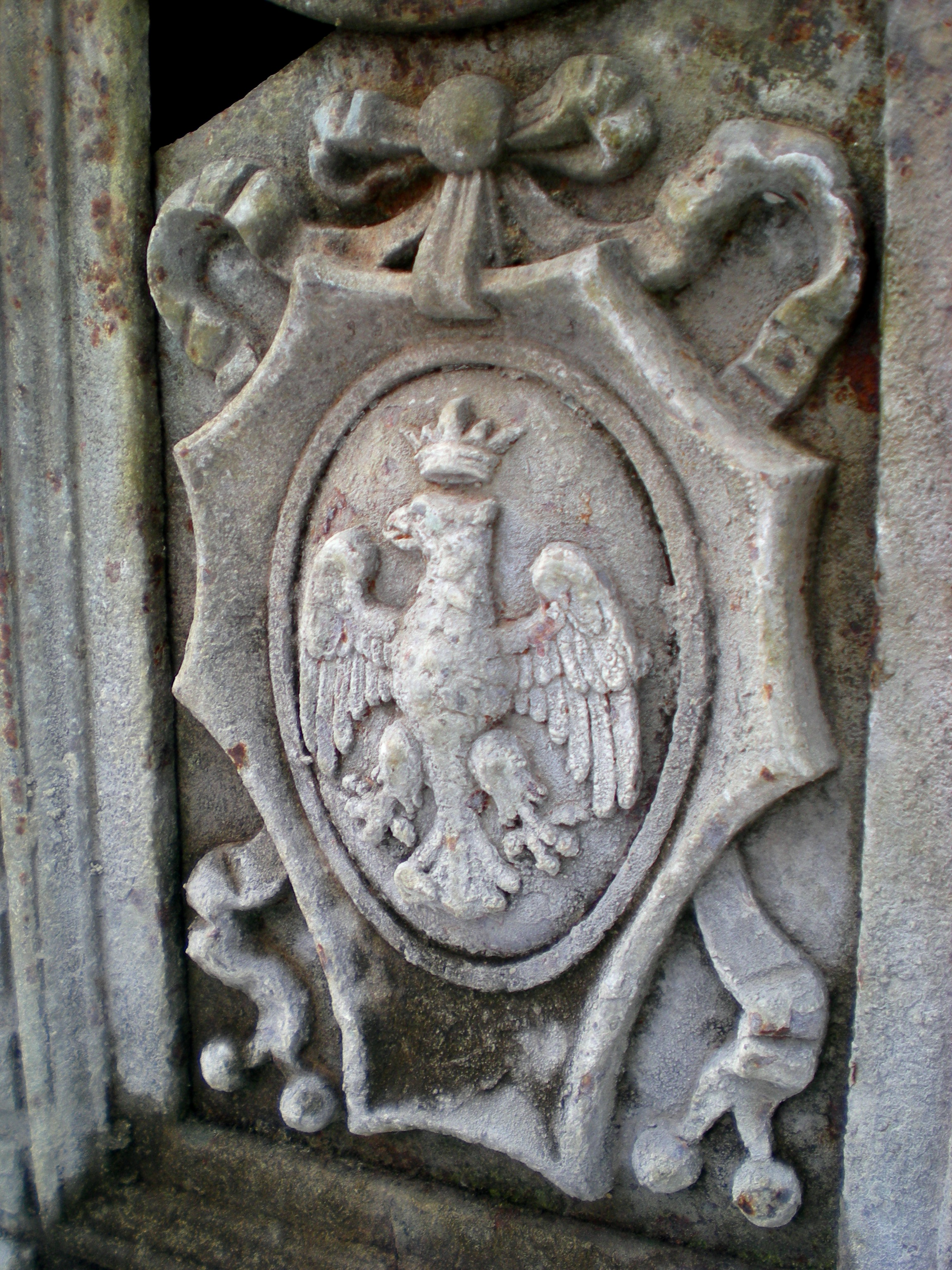 Lo stemma settecentesco della città dell'Aquila all'interno del parco intorno al Forte spagnolo